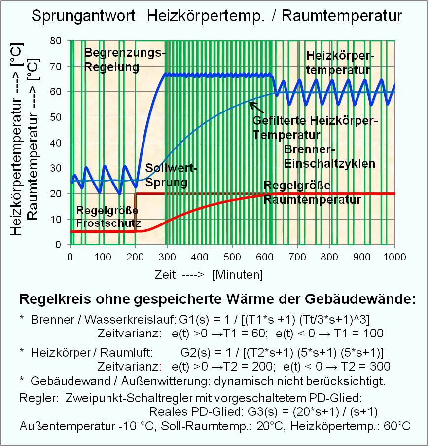 Grafische Darstellung des Verlaufes der Heizkörper- und Raumtemperatur ohne Energiespeicherung der Gebäudewände.